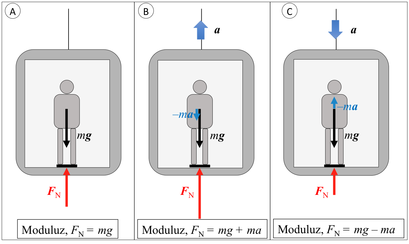 Igogailu barruan gora behera, kontuan hartu beharreko inertzia-indarren eskema, itxurazko pisua zer den azalduz.